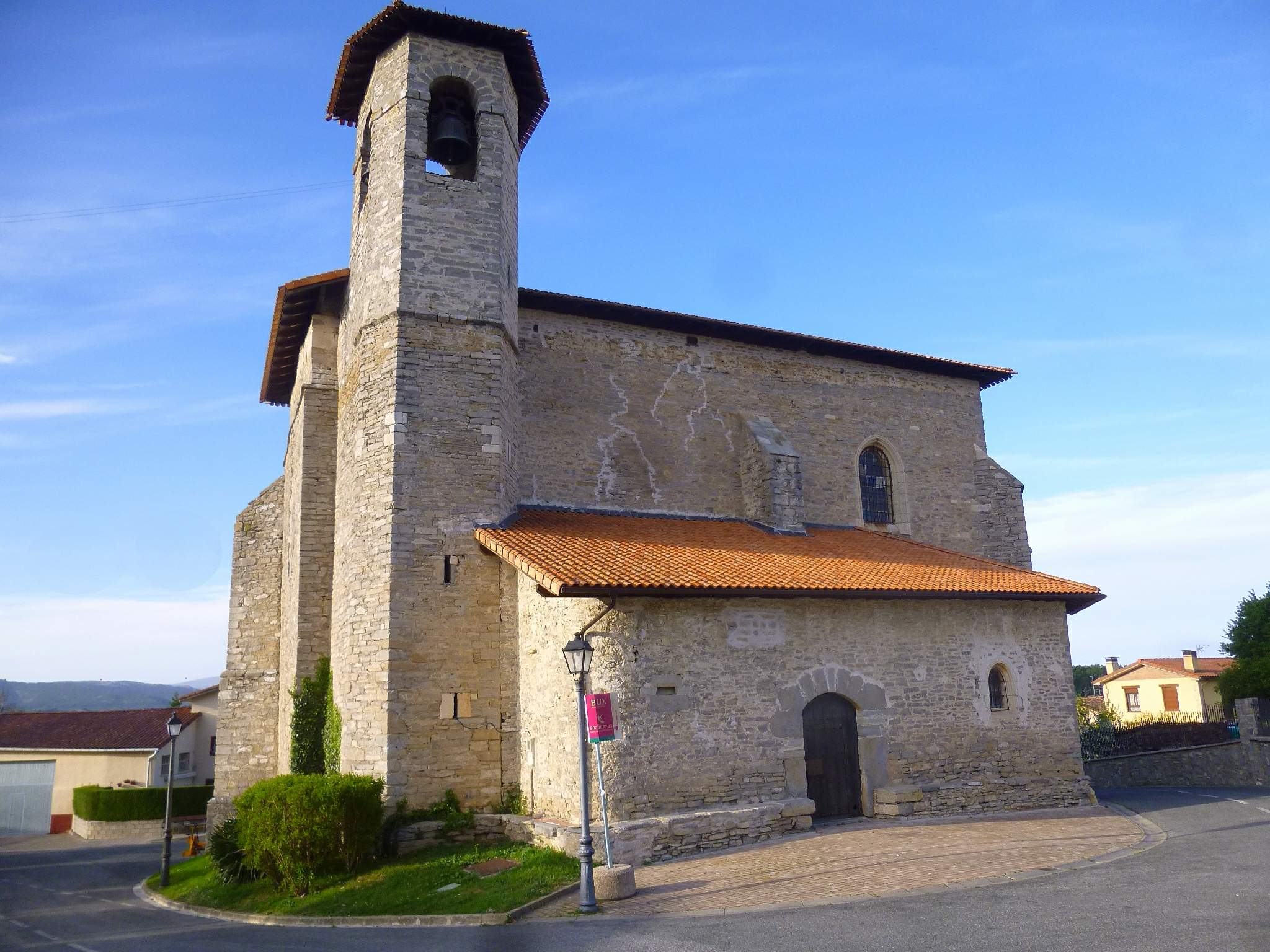 Margarita (Vitoria, Álava) - Iglesia de Santo Tomás Apóstol